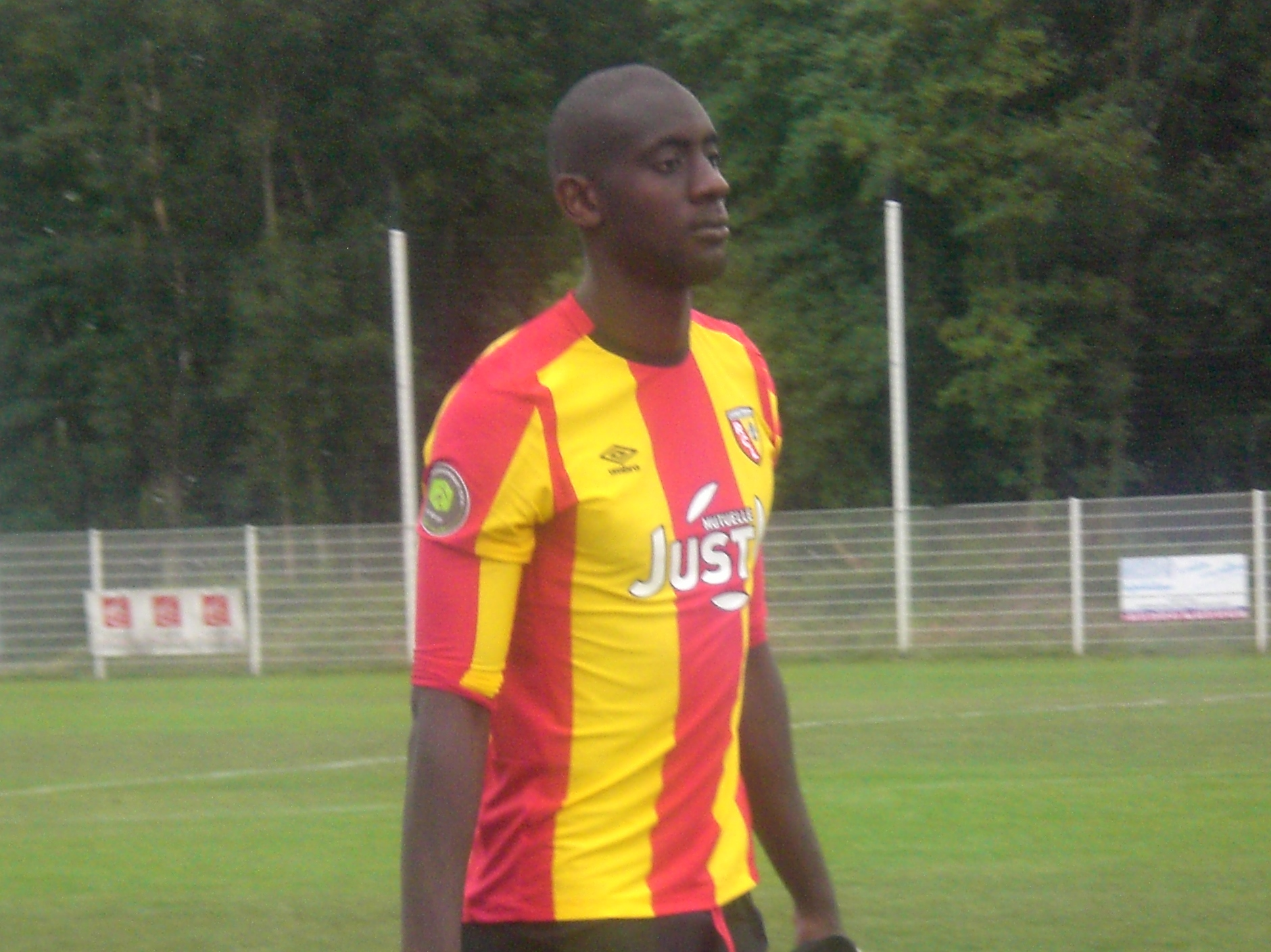 Abdoul Ba après le match amical Lens B - AC Amiens, le 8 août 2015, à Vimy (Pas-de-Calais)